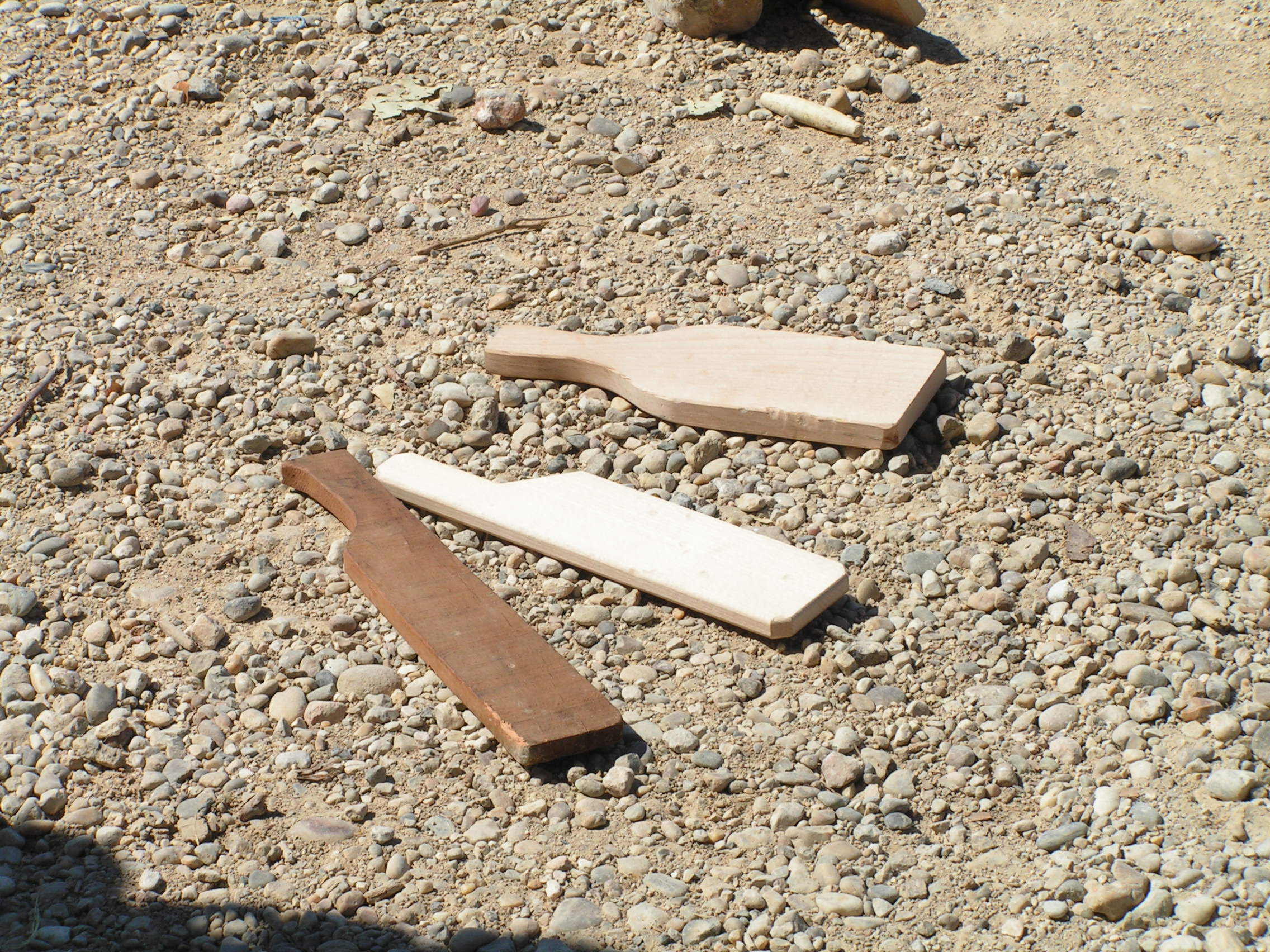 Pales per jugar a bèlit. Aquestes pales són de diferents llocs on es juga al bèlit. De dalt a baix: Amposta, Castelló i Girona